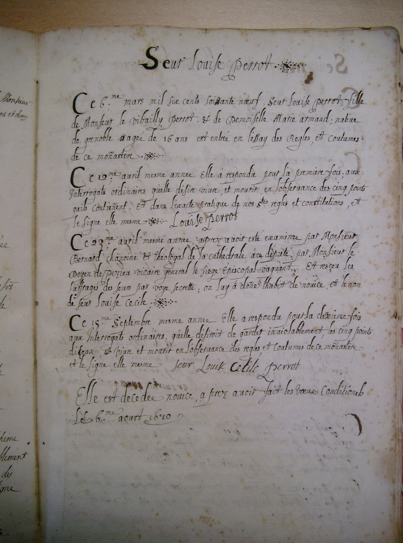 Livre des vêtures du monastère Sainte-Cécile.Sortie prématurée par décès